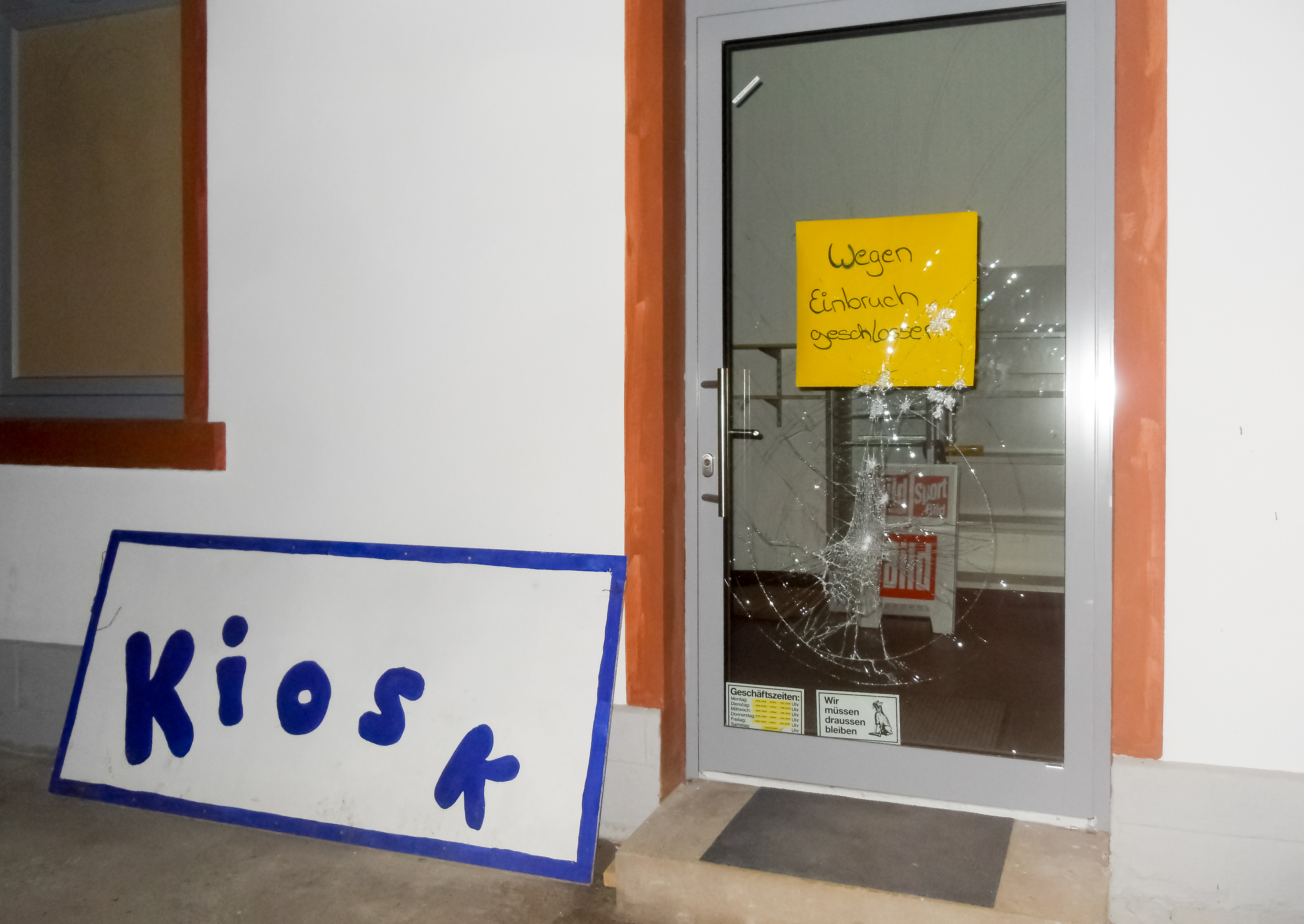 Geschlossenes Kiosk mit beschädigter Eingangstür nach einem Einbruch im Bahnhofsgebäude des Bahnhofs Guntersblum in Rheinland-Pfalz